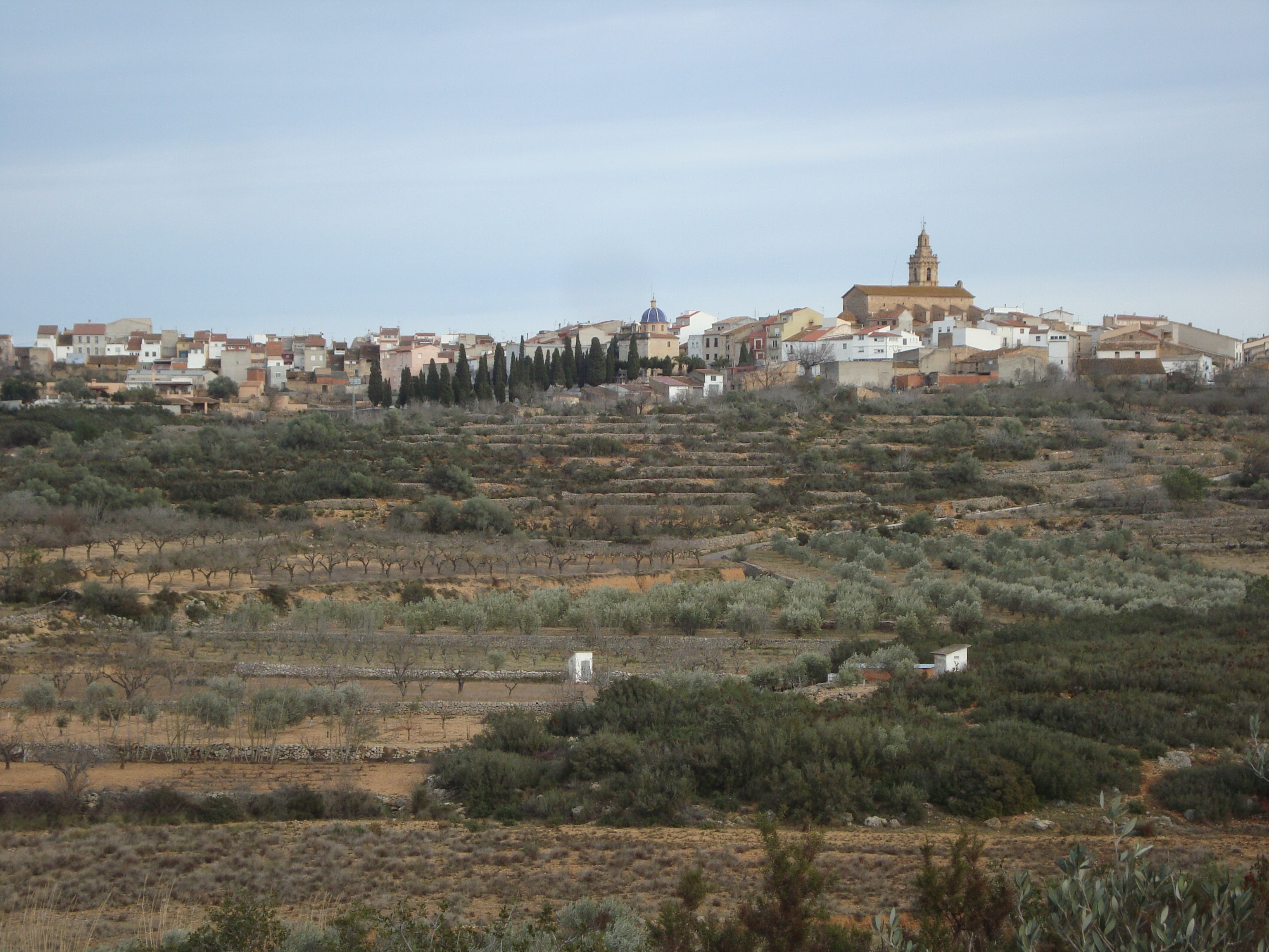 Villanueva de Alcolea, provincia de Castellón.